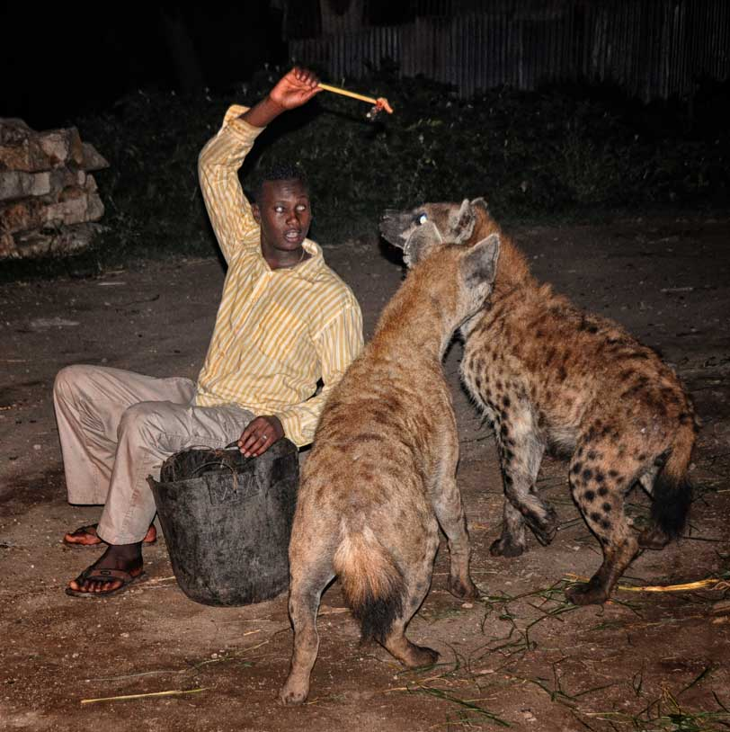 Ethiopia